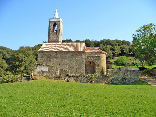 Hortsavinyà, Serralada del Montnegre, el Maresme